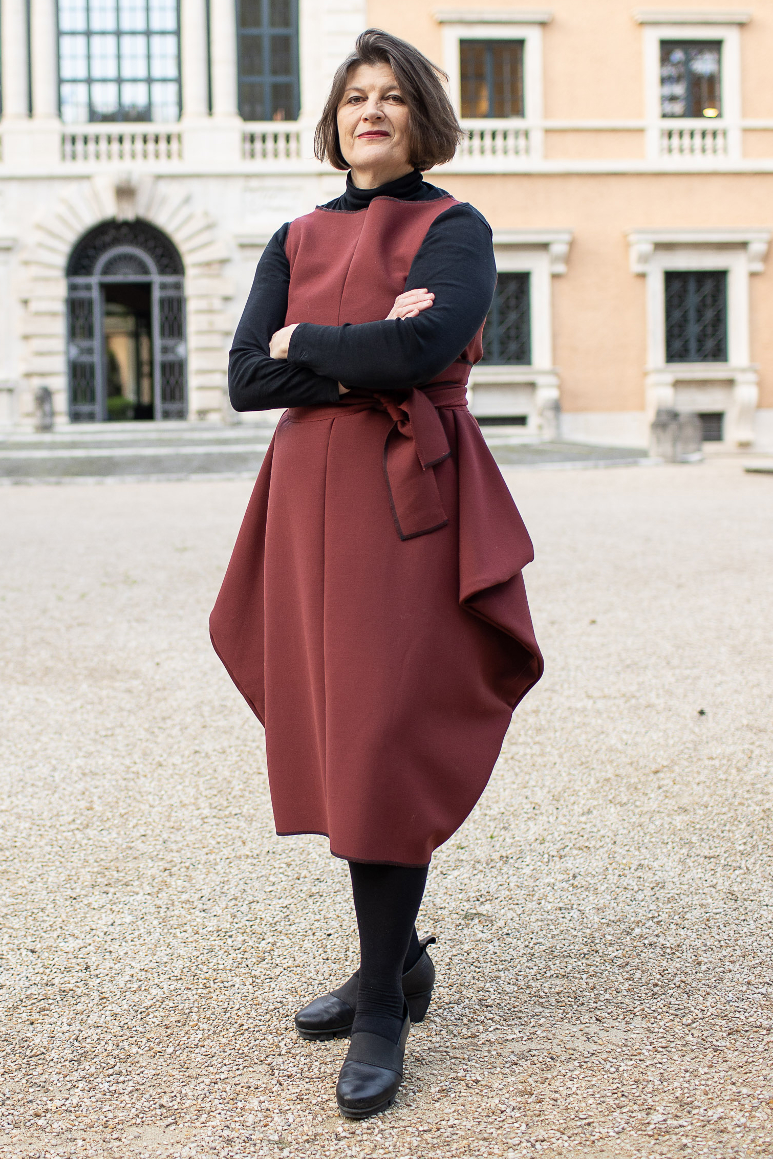 Julia Draganović, Leiterin der Deutschen Akademie Rom Villa Massimo, vor dem Haupthaus der Villa Massimo (2020)